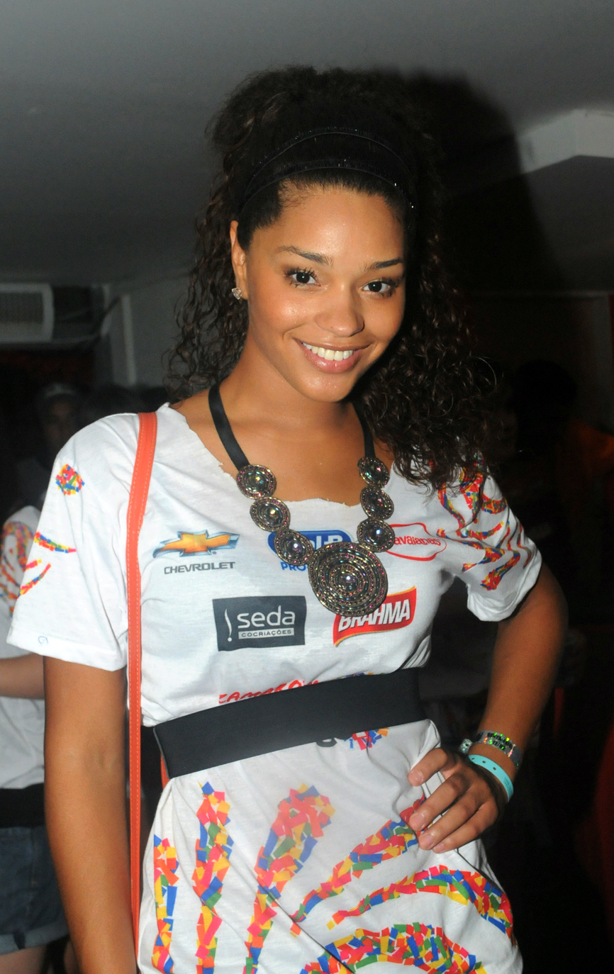 A atriz Juliana Alves.